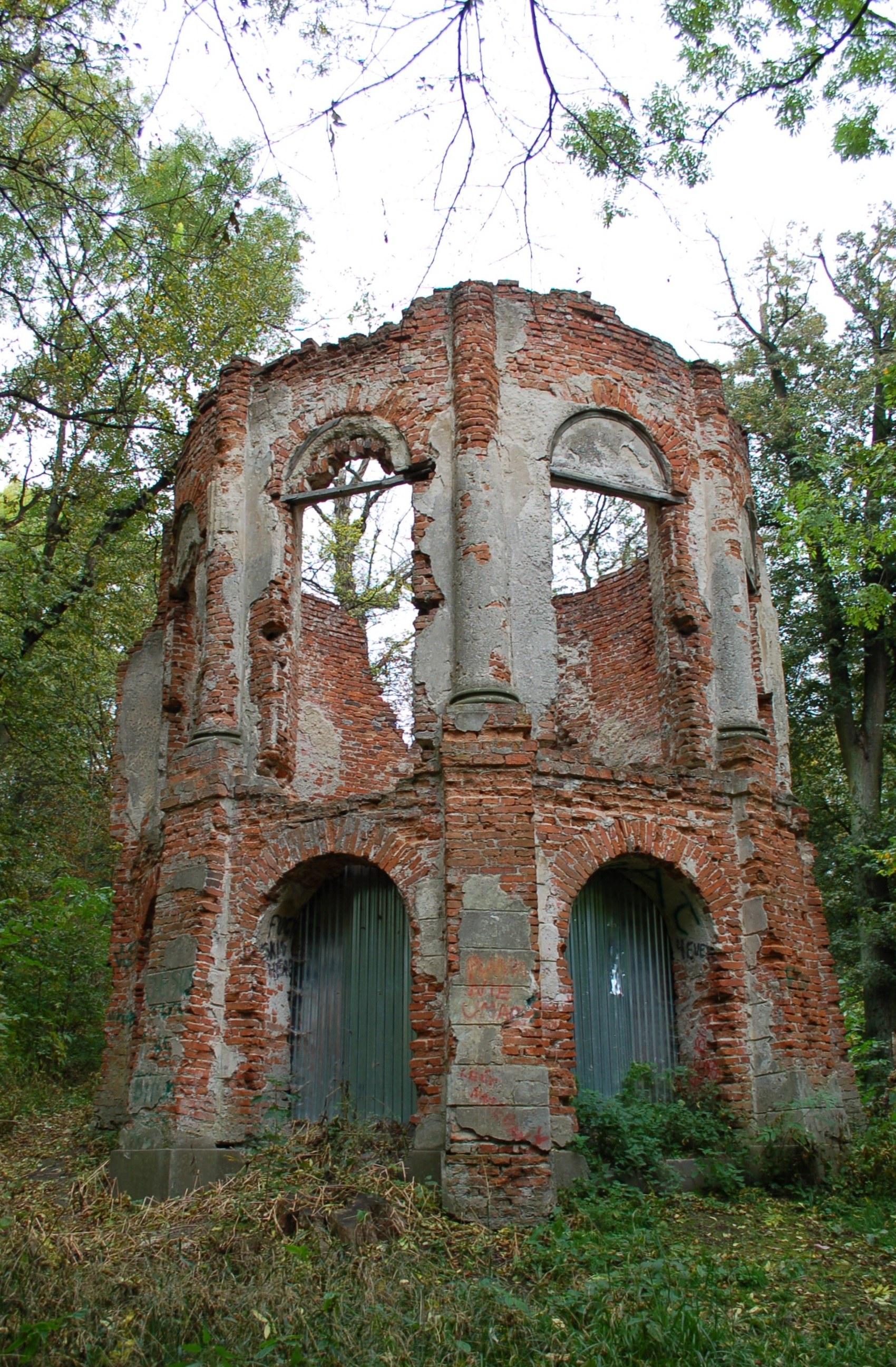 Morysin Warschau